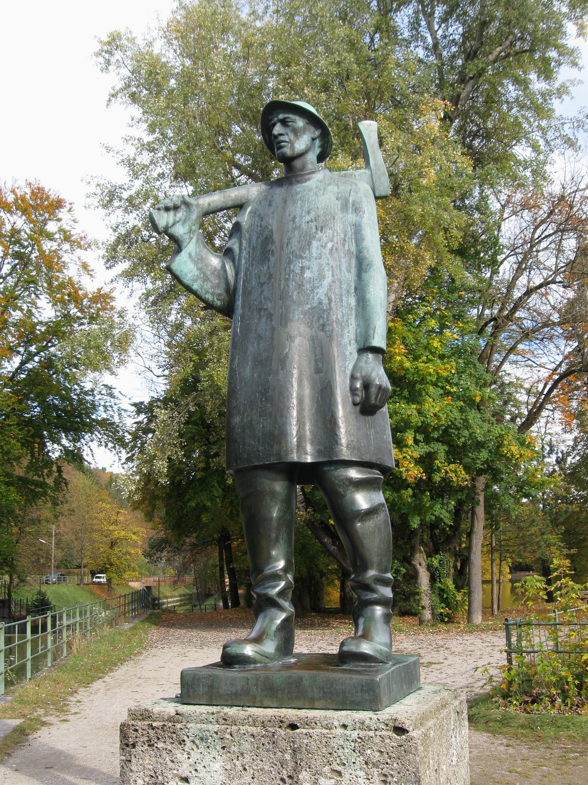 Hinterbrühl; Flößerdenkmal, Bronzefigur, 1939 von Fritz Koelle.